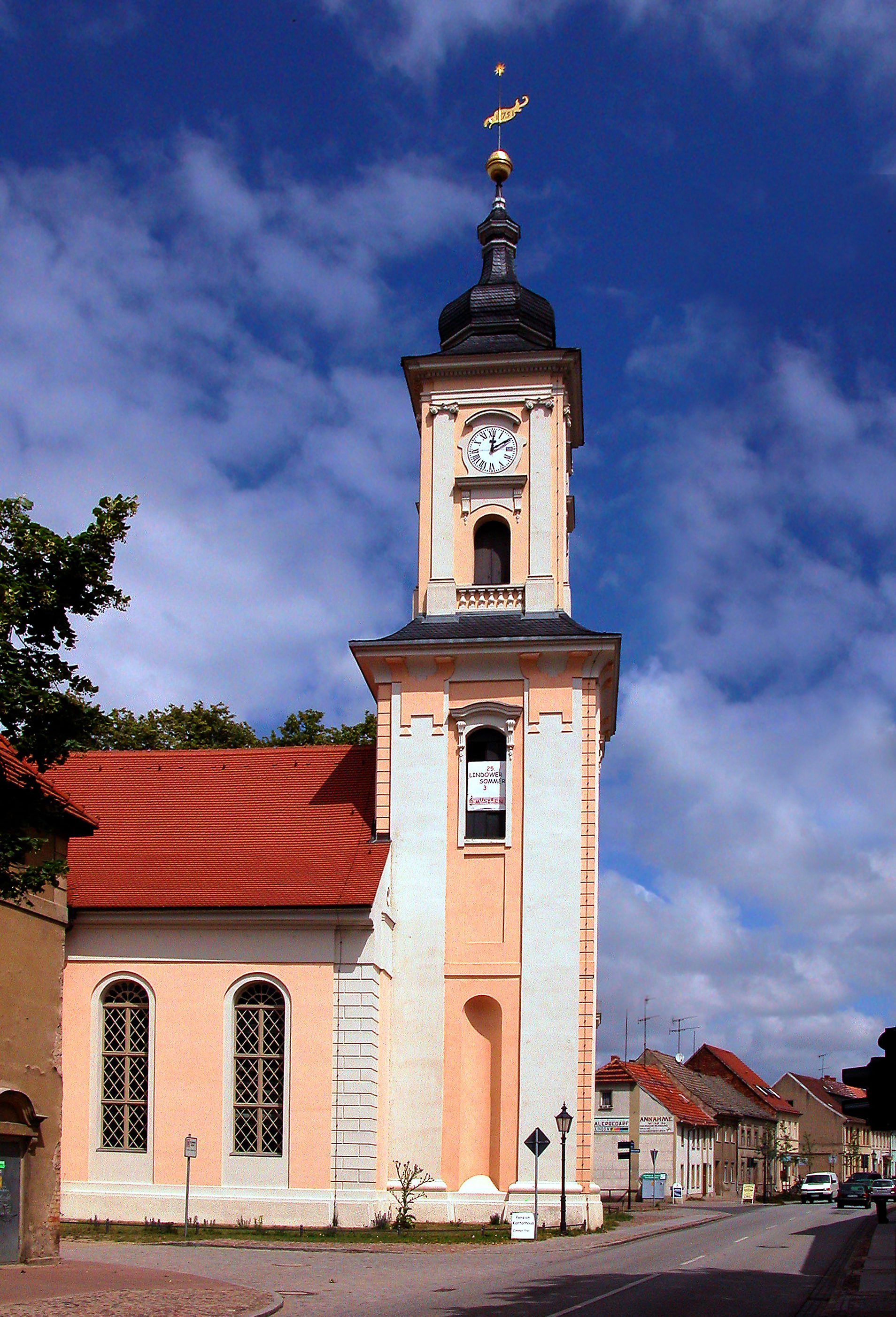 10.07.2003 16835 Lindow (Mark), Straße des Friedens 77 (GMP: 52.969082,12.985842): Pfarrkirche, Barockbau 1751-1755 nach Plänen von Georg Christoph Berger als lutherische Stadtkirche. [DSCN]20030710120DR.JPG(c)Blobelt